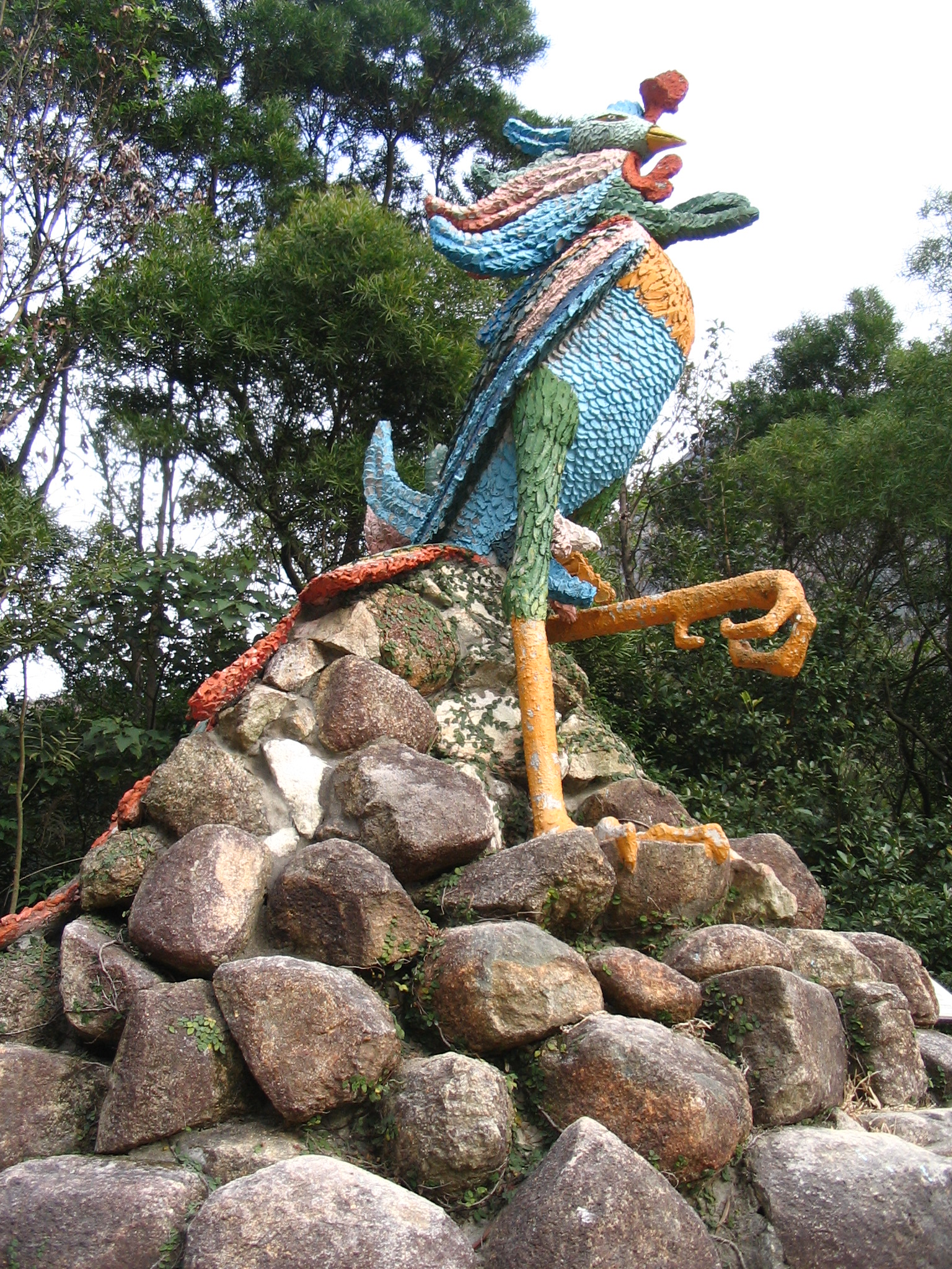 Fung Wong Statue at Lantau Trail Stage 3